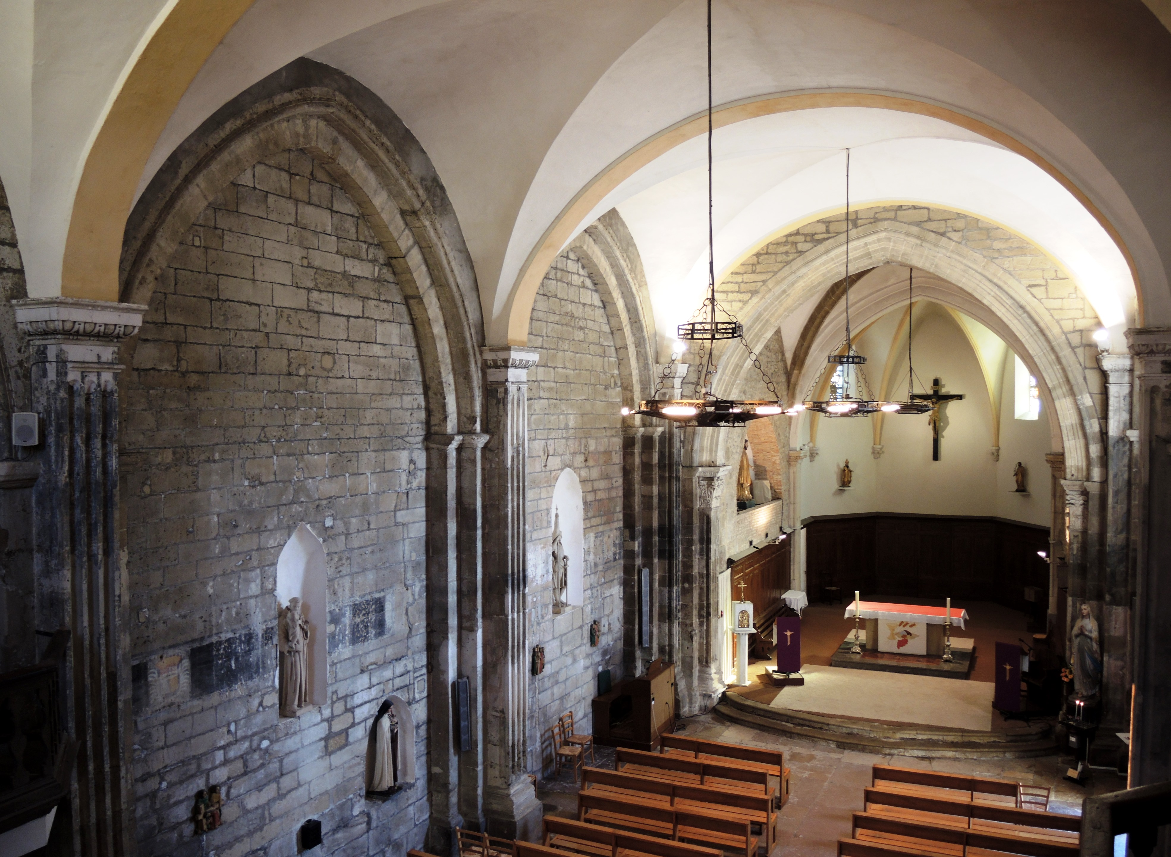 Andance vue générale et détails